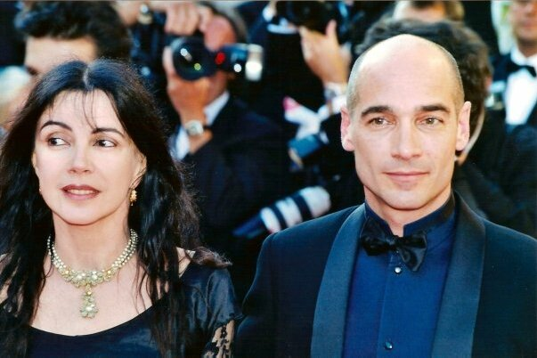 Carole Laure et Jean-Marc Barr au festival de Cannes.